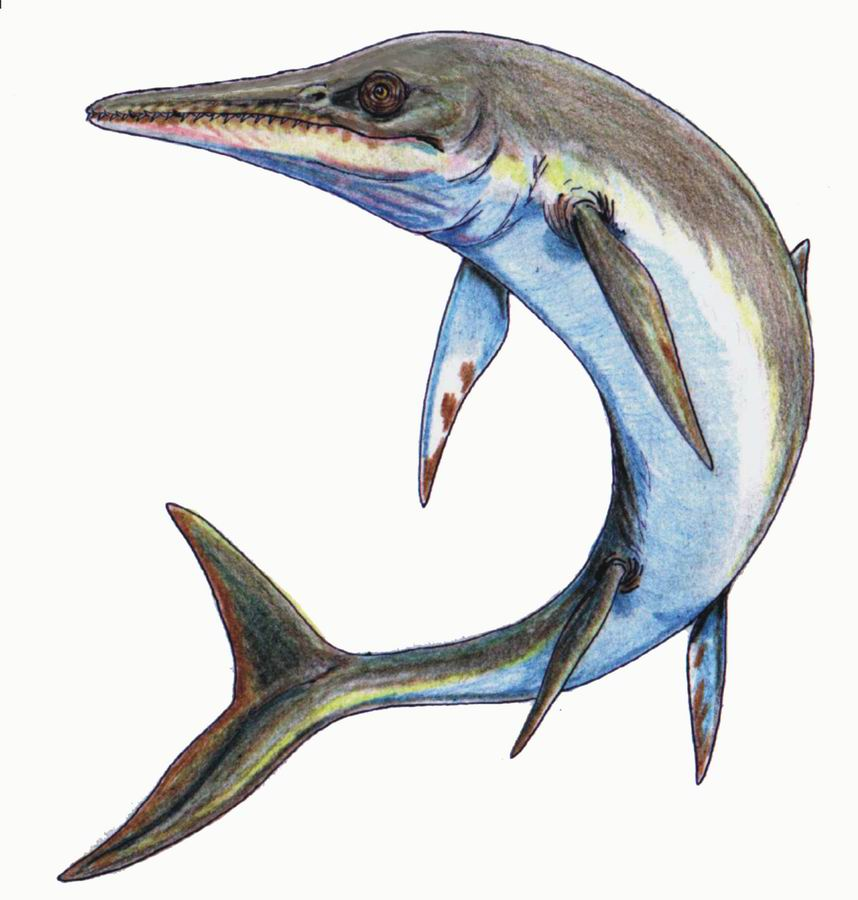 Темнодонтозавр, Temnodontosaurus platyodon.